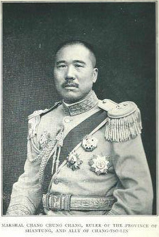 张宗昌